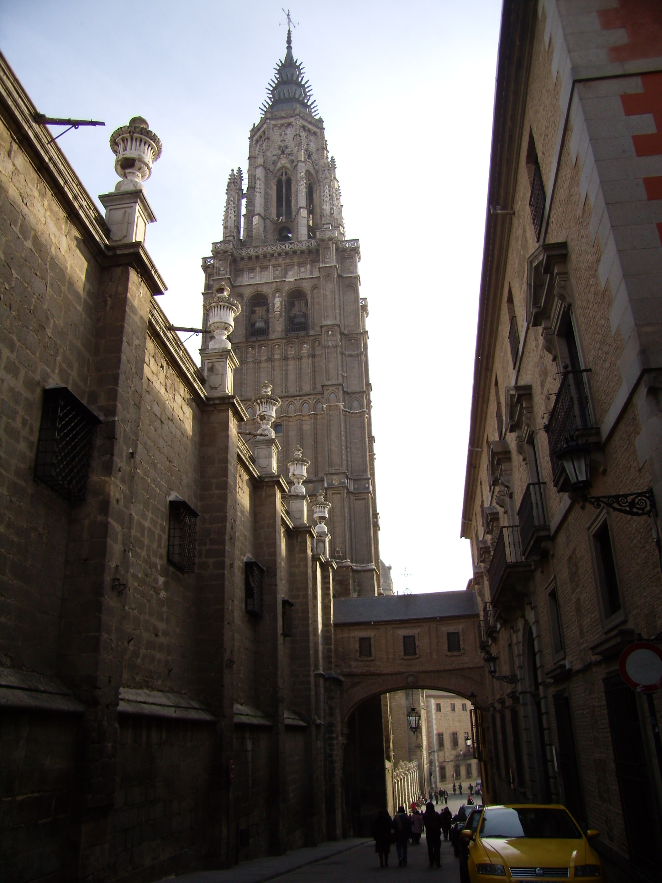 Torre de la Catedral de Toledo (España)